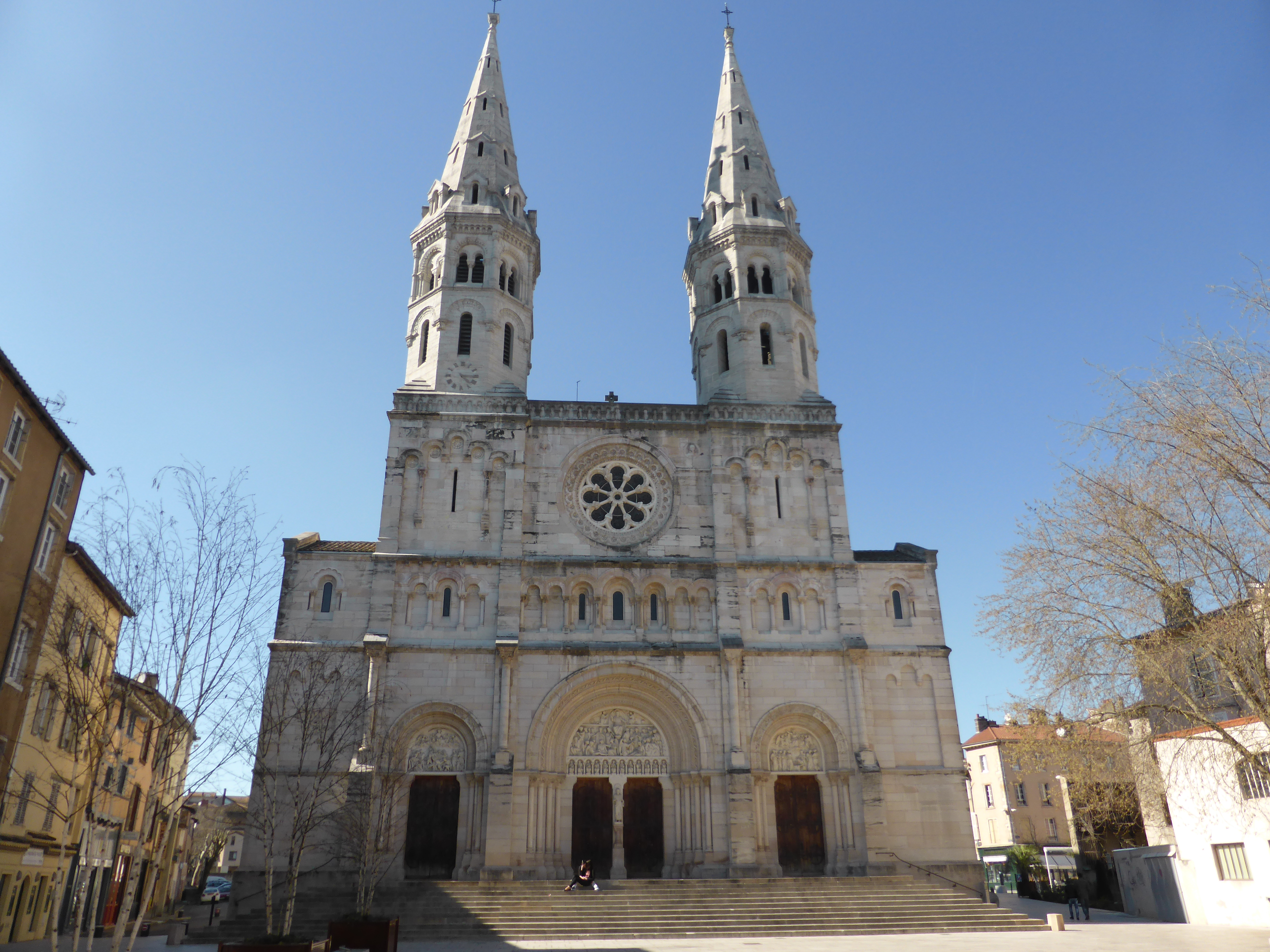 Bourgogne april 2015